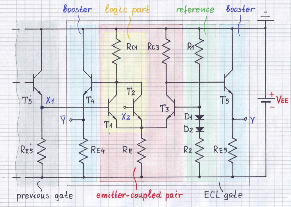 Emitter-coupled circuit (structure)